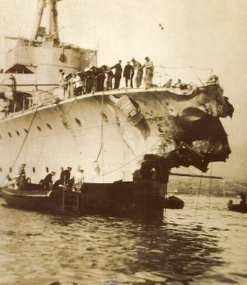 Der Bug der Caledon nach Kollision im Januar 1928